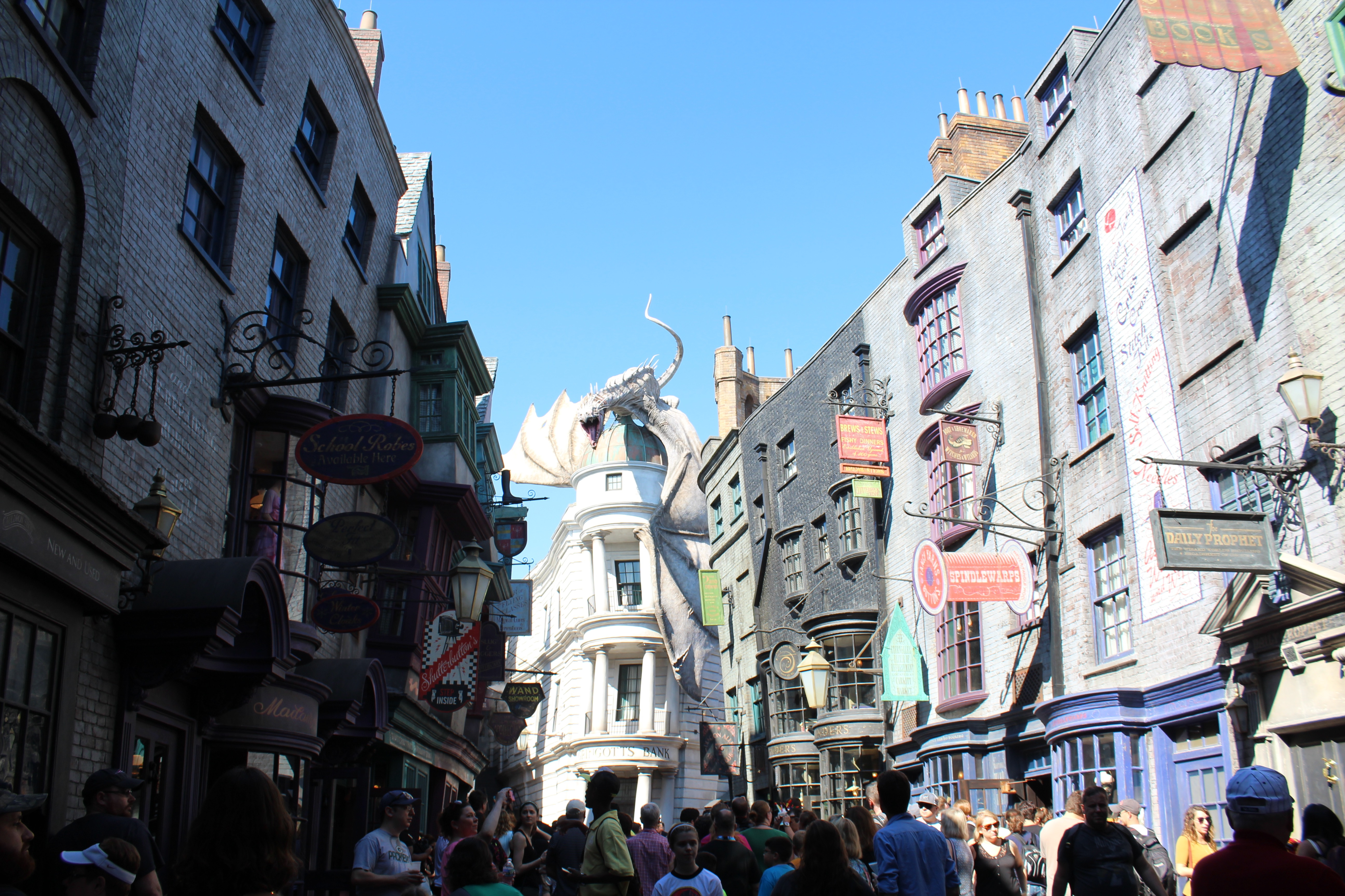 Universal Studios Florida